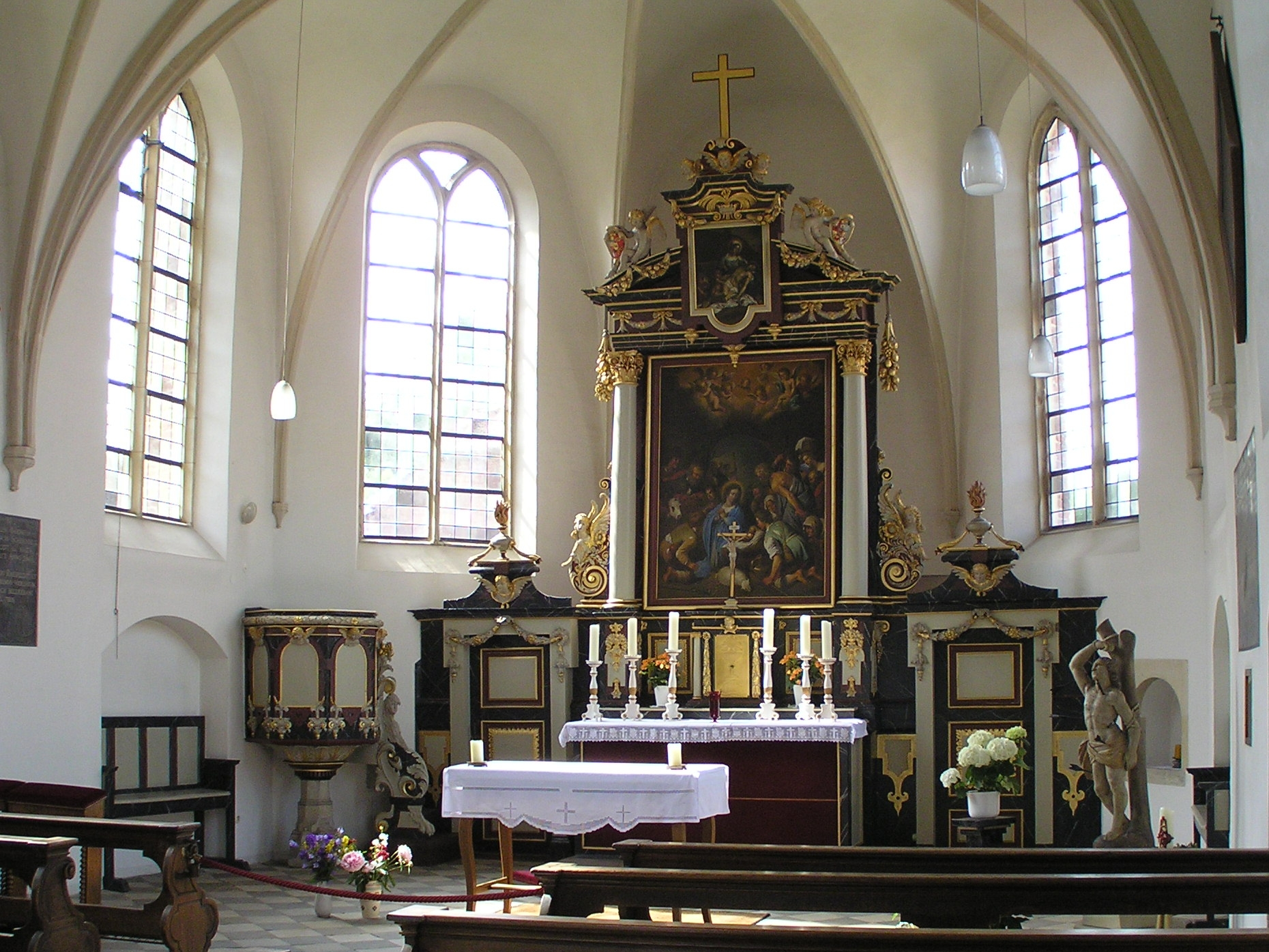 Chorraum der Schlosskapelle St. Sebastian bei Schloss Raesfeld